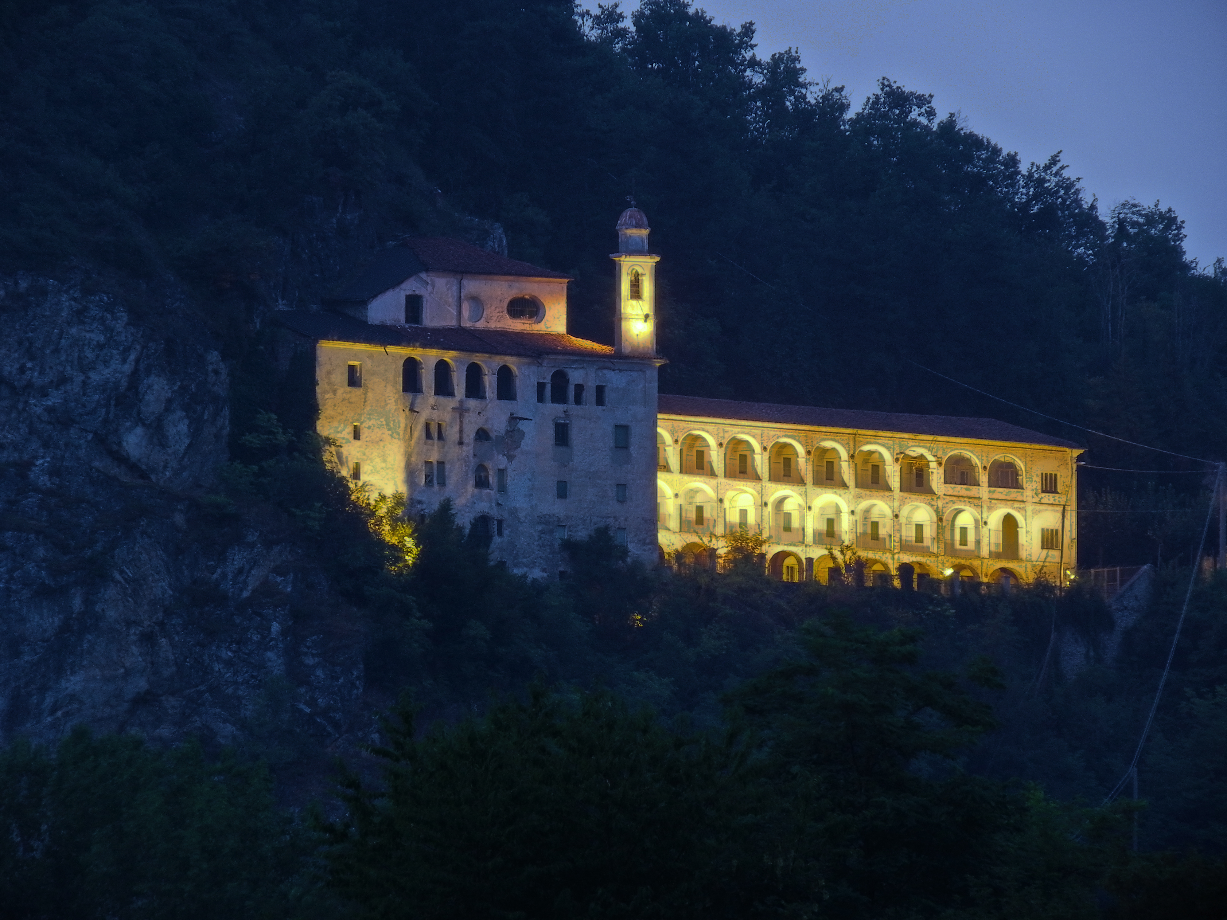 Il Santuario fotografato in notturna